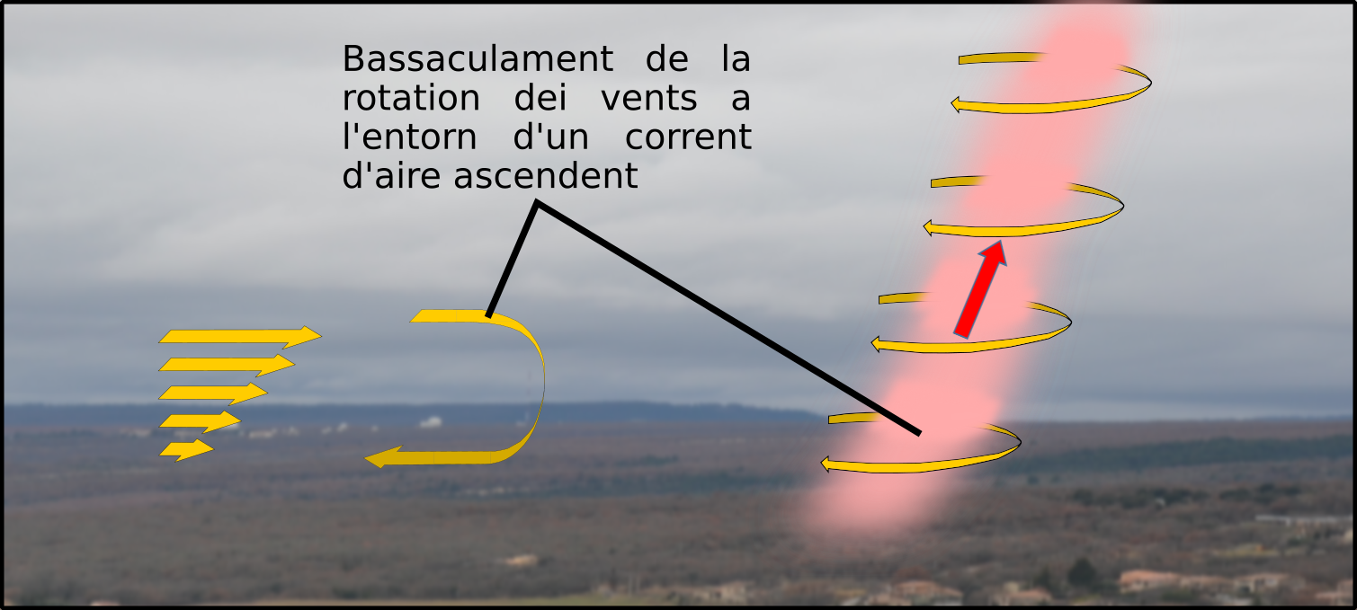 Mesa en rotacion dei vents a l'entorn d'un corrent d'aire ascendent.